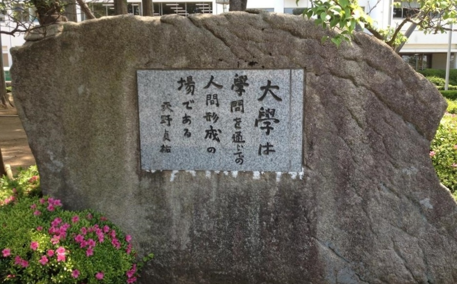 獨協大学建学の碑